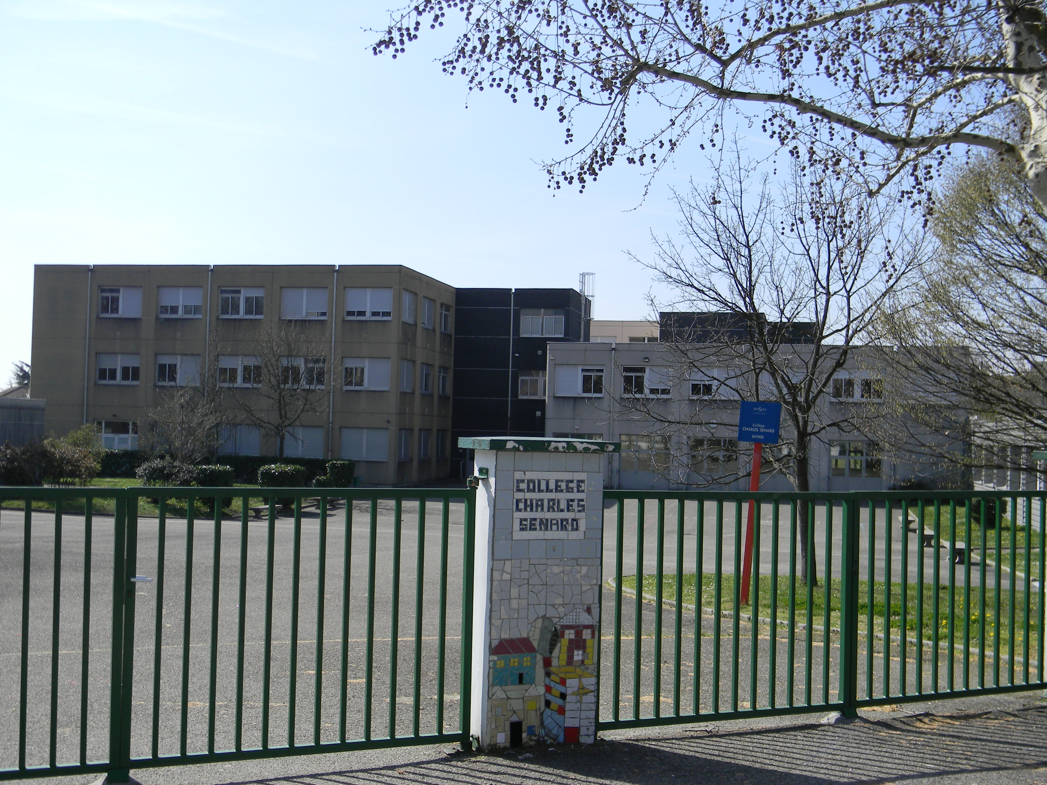 Collège Charles Sénard à Caluire-et-Cuire